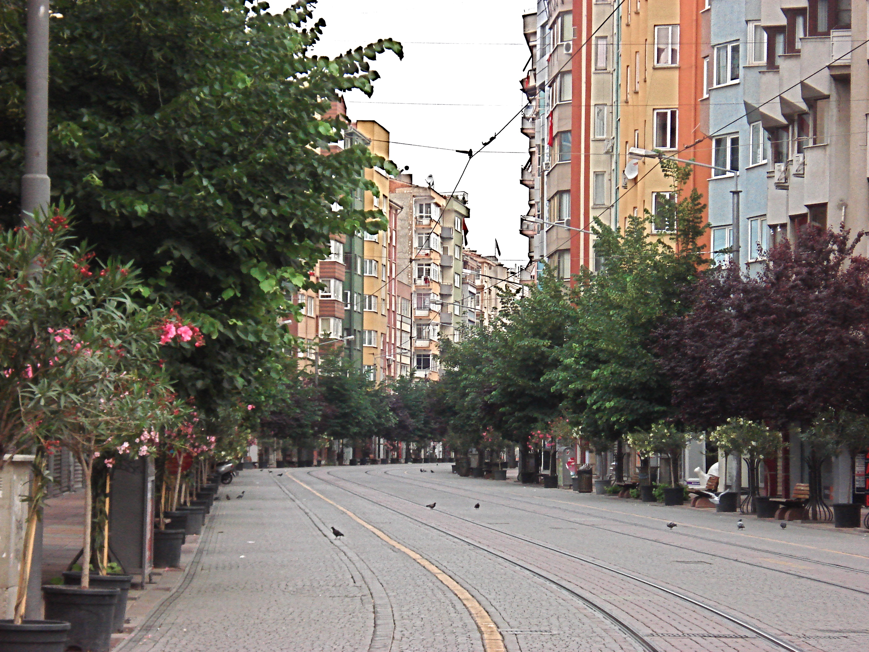 Estram yolu, Eskişehir